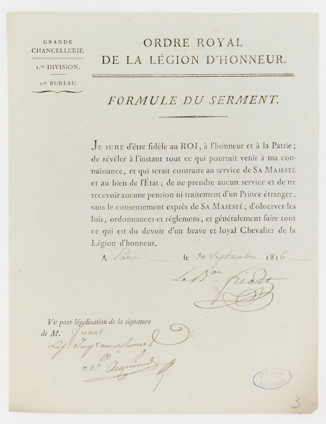 Serment de fidélité à Louis XVIII prêté par Jean-François Friant, provenant de son dossier de Légion d'honneur, Archives nationales, LH/1037/86